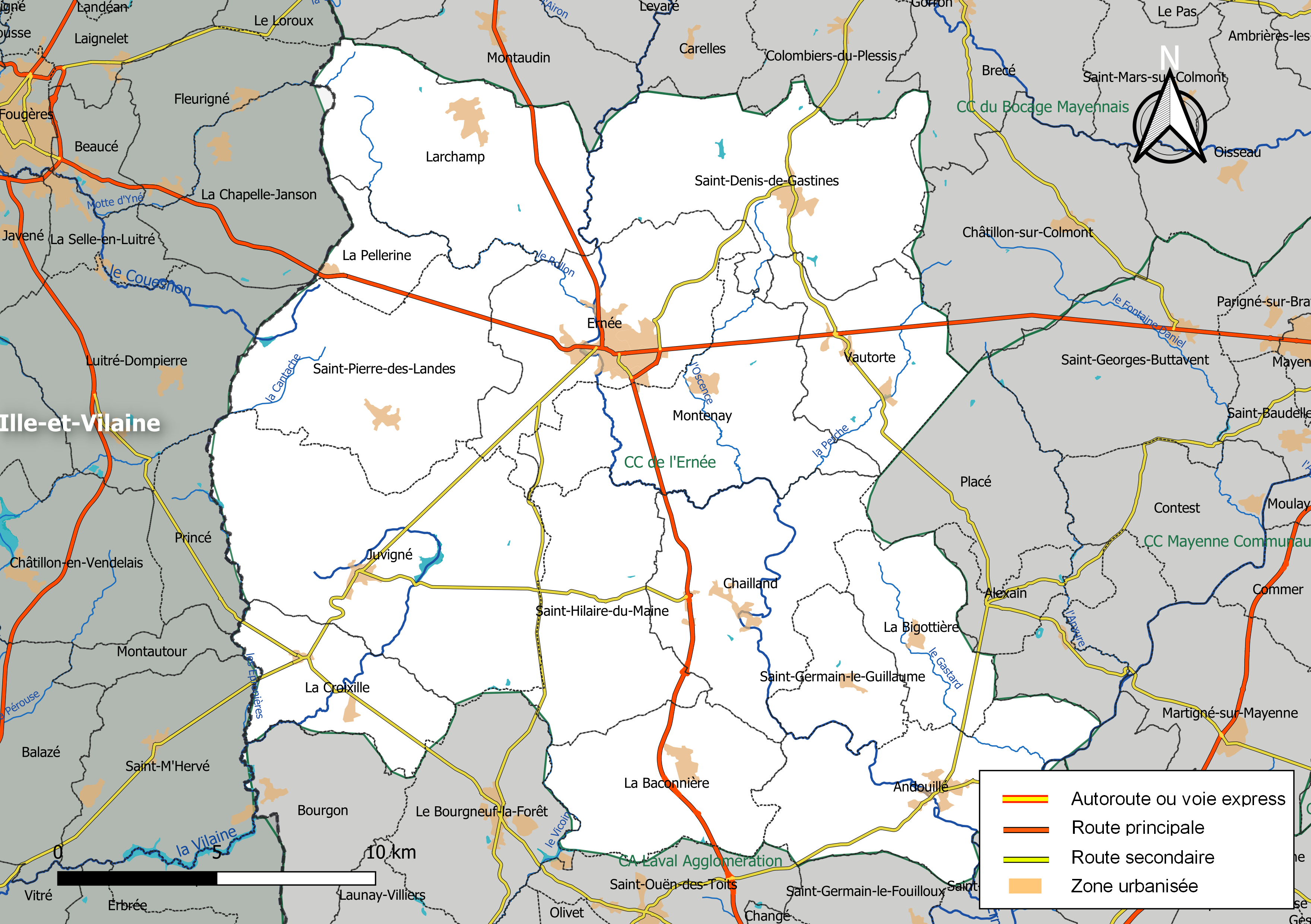 Carte géographique de la Communauté de communes de l'Ernée, département de la Mayenne, France. Composition au 1er janvier 2019.